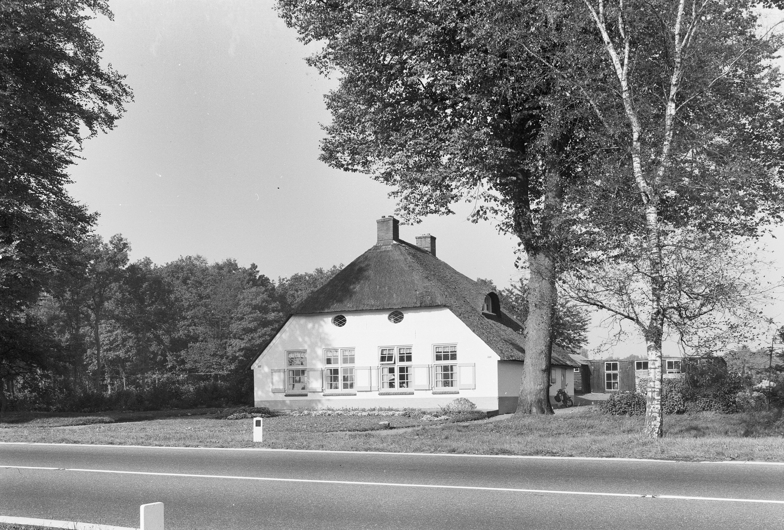 aanzicht